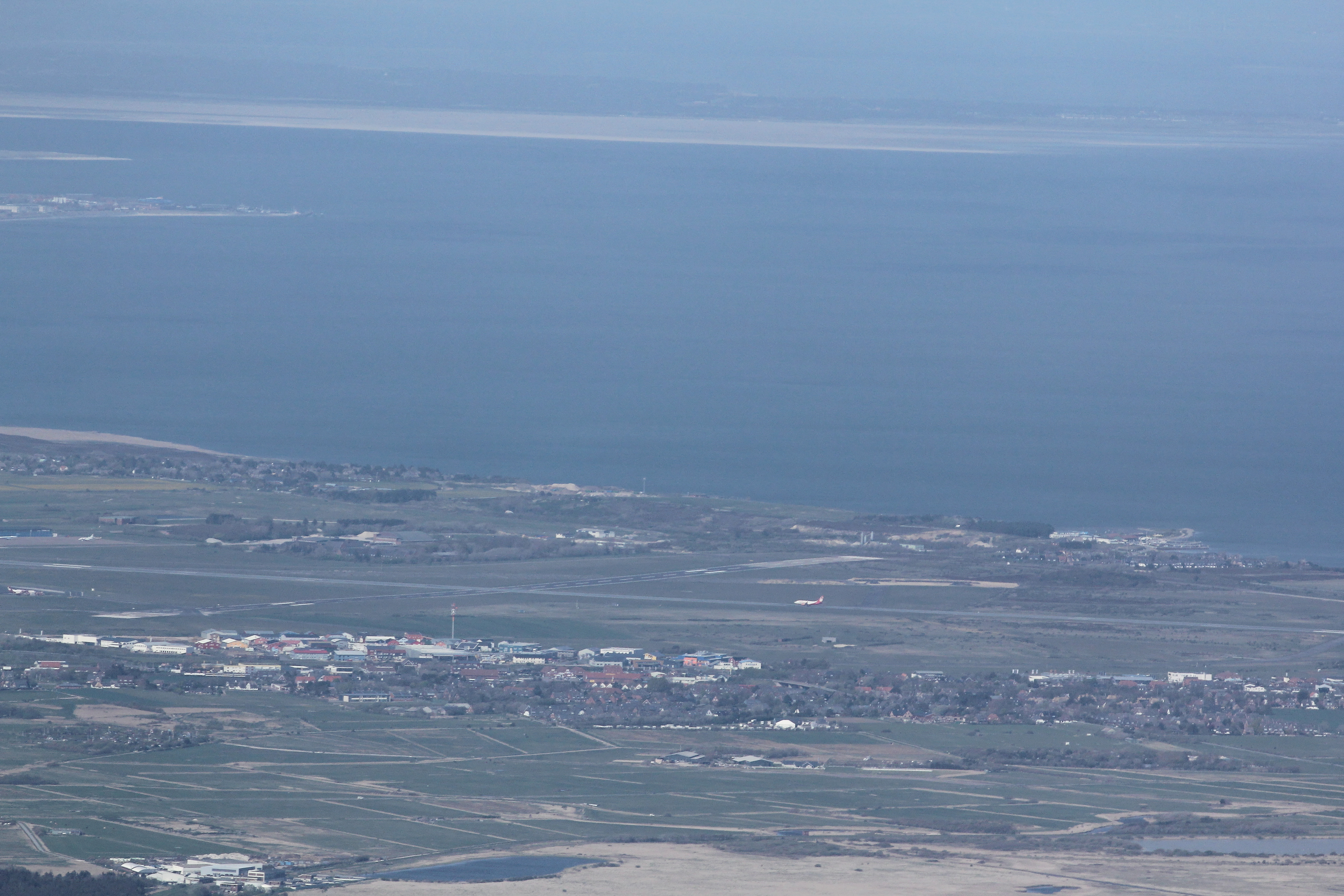 Luftaufnahme: Blick über Tinnum zum Flughafen von Sylt